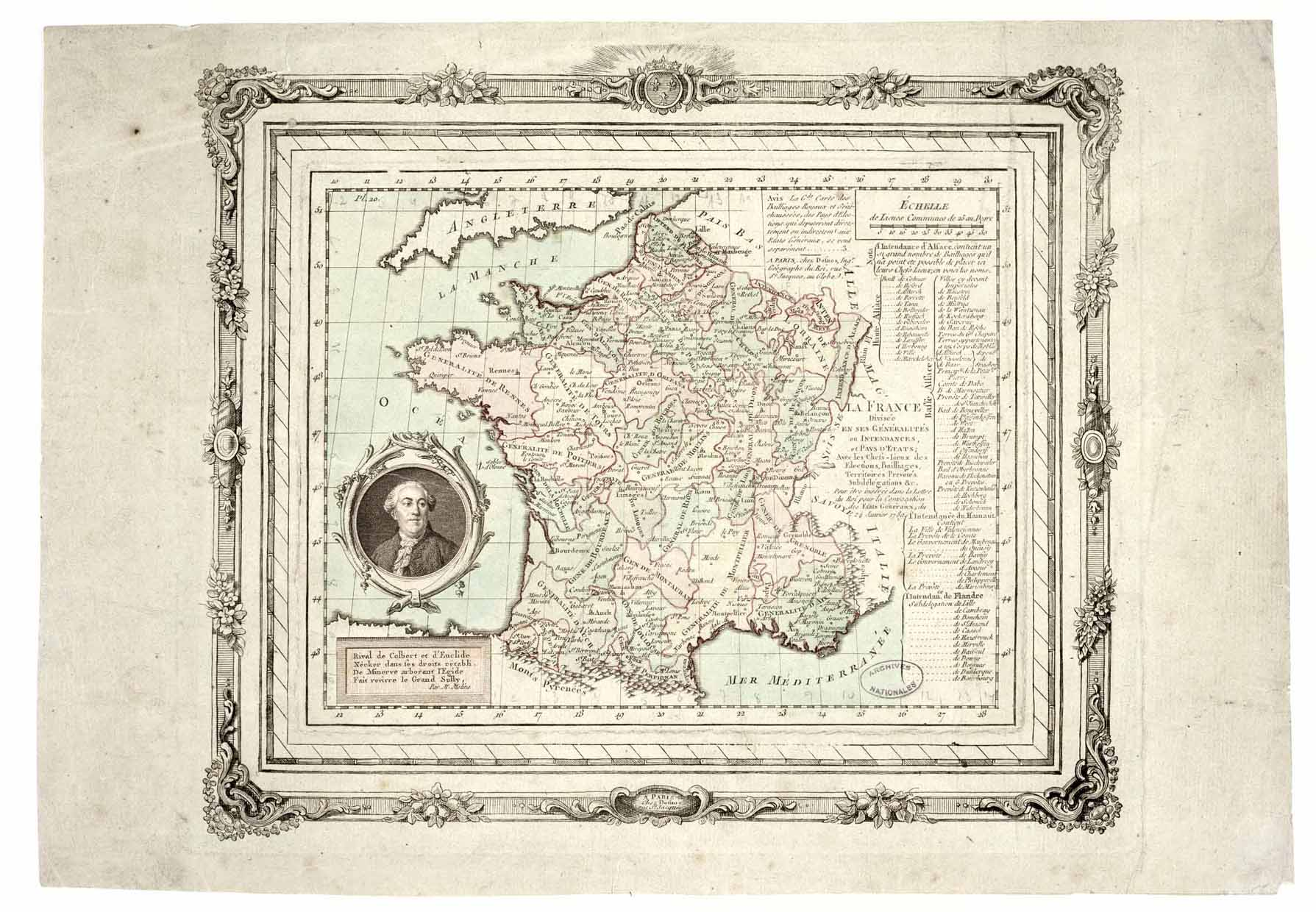 Carte intitulée "La France divisée en ses généralités ou intendances et pays d'Etats avec les chefs-lieux des élections, bailliages, territoires, prévôtés, subdélégations etc. Pour être insérée dans la lettre du roi pour la convocation des Etats généraux, du 24 janvier 1789." Gravure rehaussée de couleurs. Hors carte, à droite, liste des villes administratives des zones frontières du Nord et de l'Est, et à gauche, portrait anonyme du ministre Necker en médaillon, souligné de quatre vers de P.-L. Moline. "A Paris, chez Desnos, ingénieur géographe du roi, rue Saint-Jacques, au Globe."